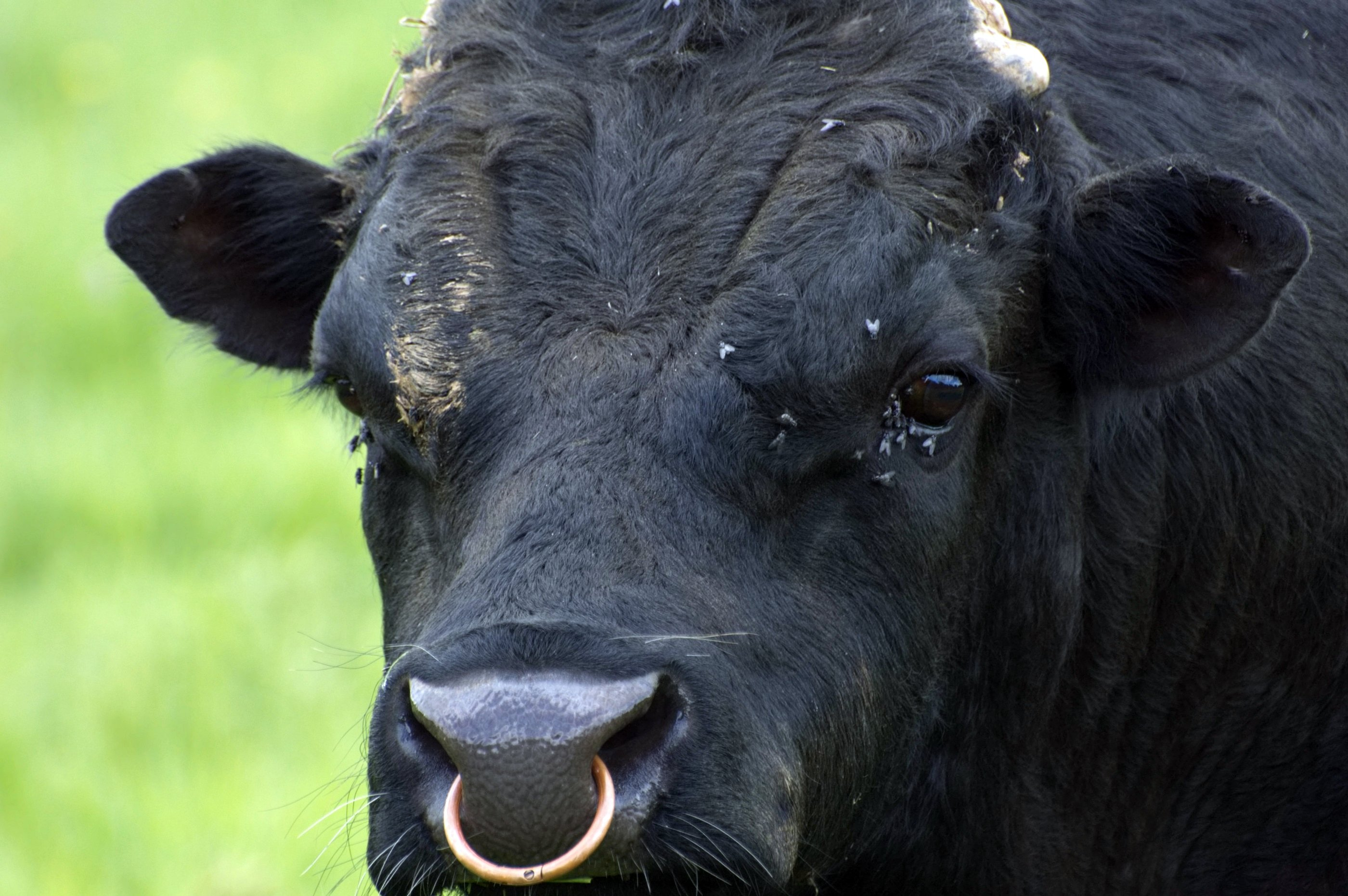 A black Dexter bull.